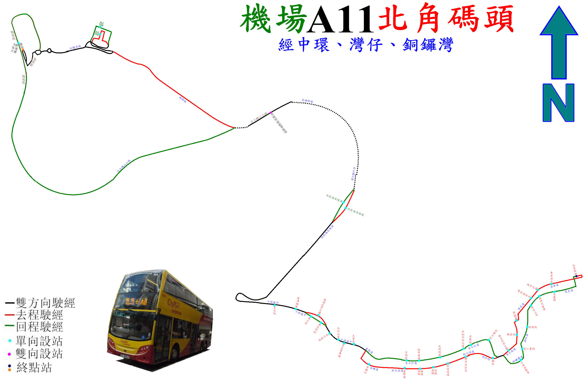 中文（香港）: 城巴機場快線A11路的走線圖